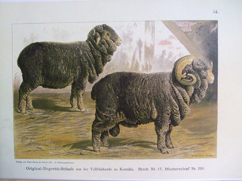 Bock 17 und Schaf 220, Original-Negretti-Schafe aus der Vollblutherde zu Kentzlin.